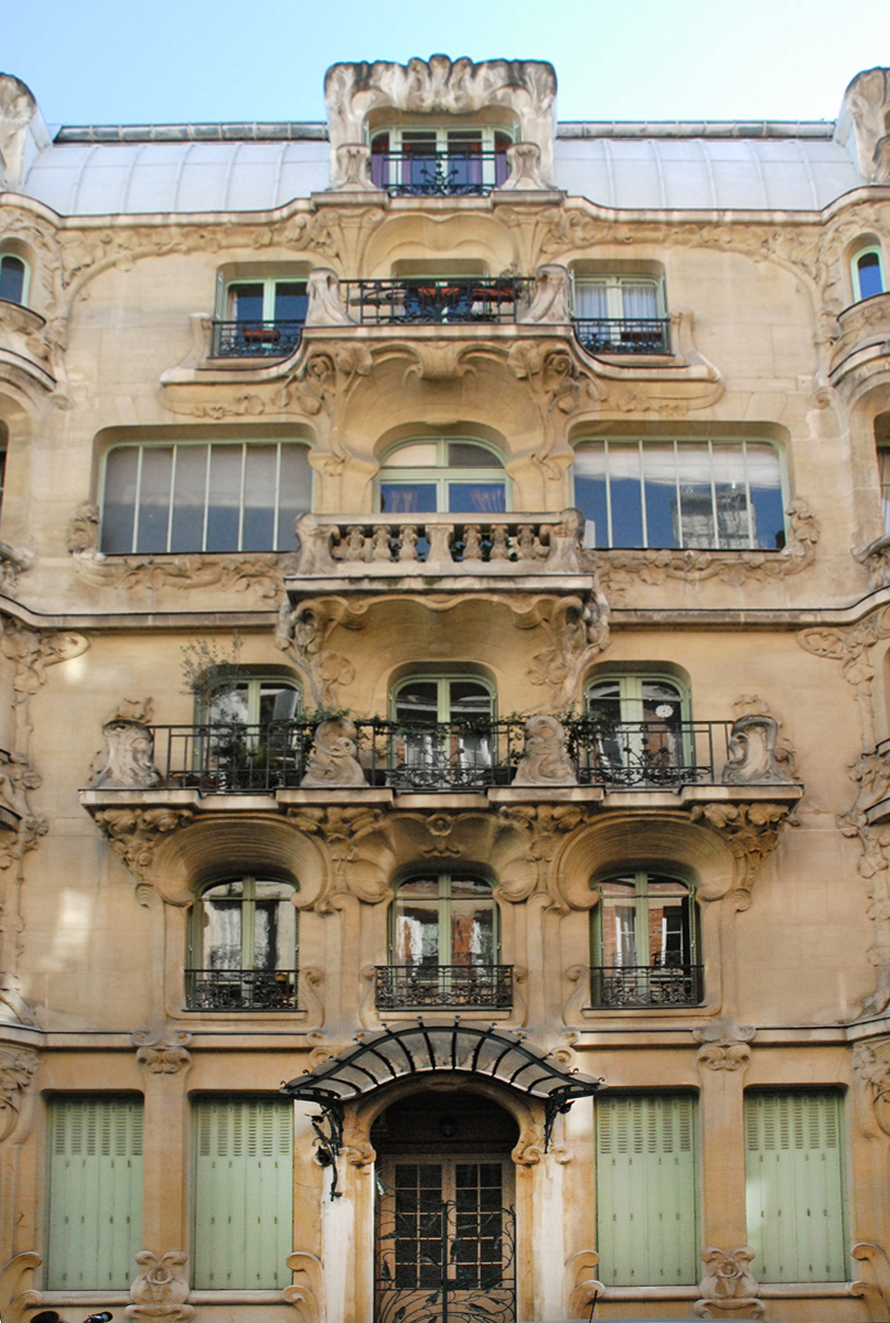 Partie centrale de la façade de l'immeuble Cet immeuble, situé au numéro 33 de la rue du Champ de Mars à Paris, a été conçu l'architecte Octave Raquin dans le style art nouveau. L'édifice a été construit pour abriter un collège privé, le cours des demoiselles Longuet. Le bâtiment, qui a été primé au concours de façades de 1902, décline des motifs intégrant des fleurs d'arum, en pierre sur la façade, autour des bow-windows et en fer forgé sur les différentes grilles. La façade sur rue et le hall d'entrée sont inscrits à l'Inventaire supplémentaire des monuments historiques depuis le 29 novembre 1985 On remarquera la qualité et l'originalité du décor autour des fenêtres centrales